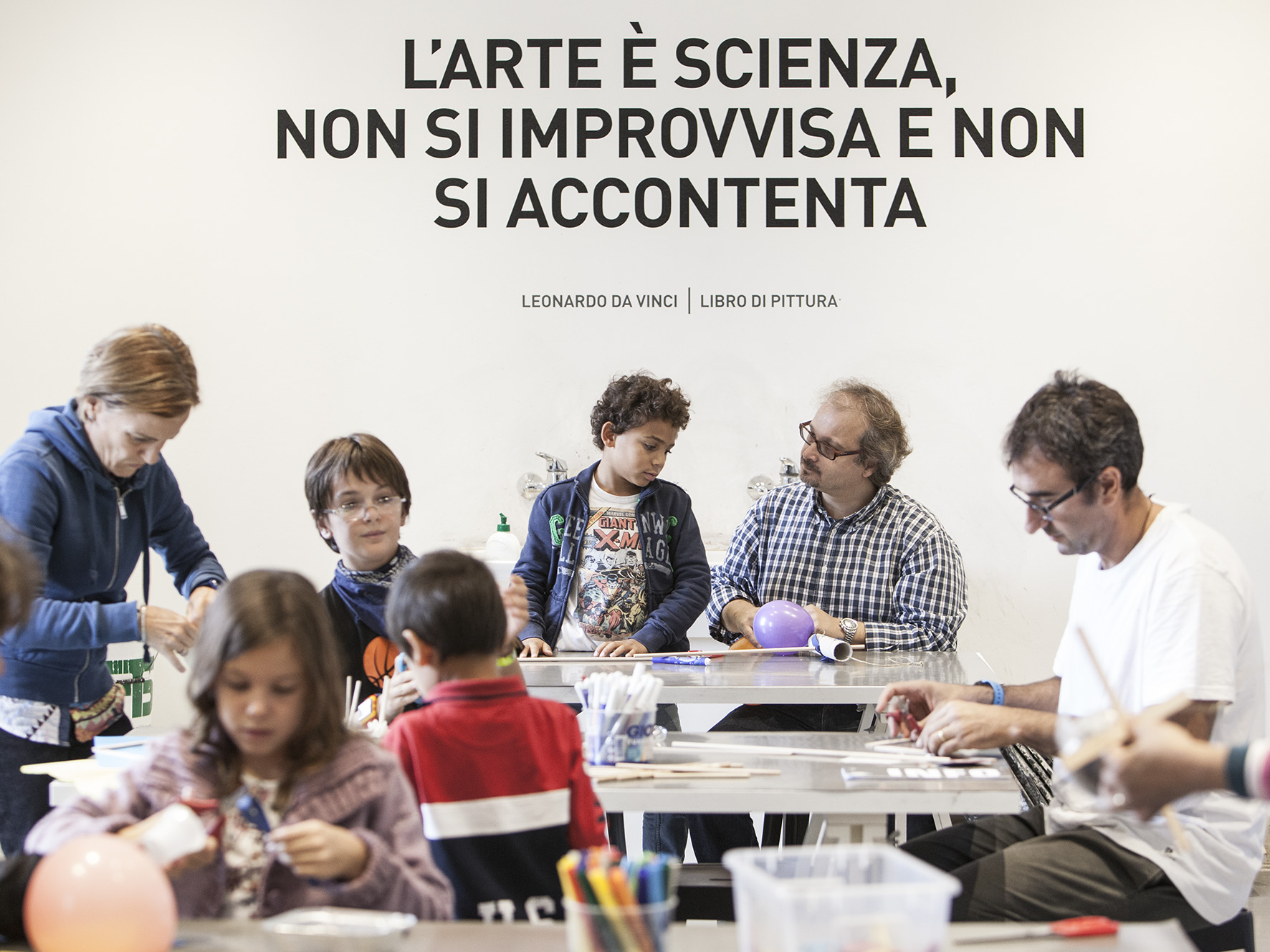 Laboratorio didattico nel Museo nazionale della scienza e della tecnologia Leonardo da Vinci, Milano. Foto di Lorenzo Daverio.